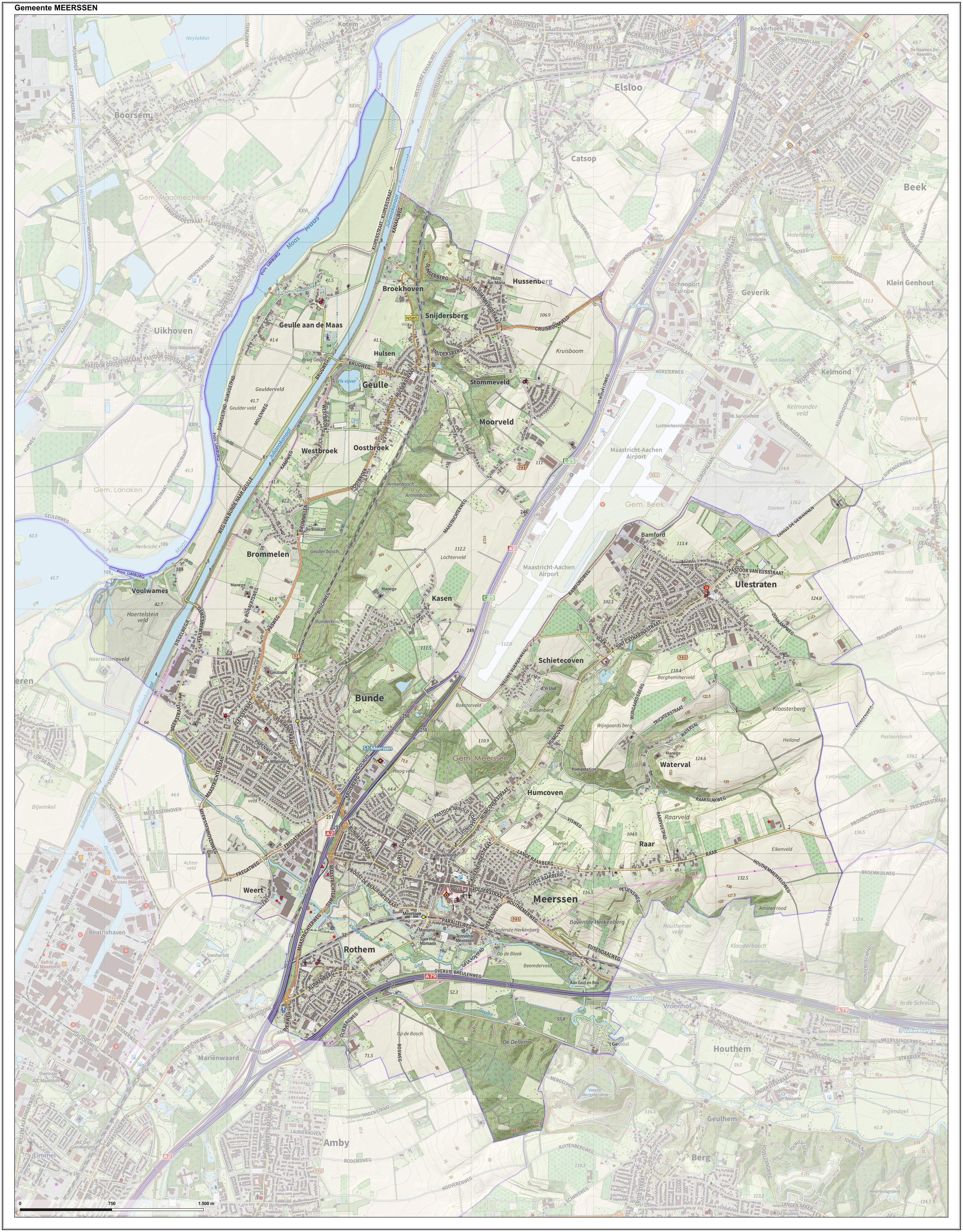 Topografische gemeentekaart. Resolutie: 400 pixels/km. Kaartbeeld samengesteld uit de open geodata van de Top10NL en Top25namen (Kadaster), Creative Commons-BY licentie. Gebouwvlakken uit open geodata BAG extract. Wegen uit de OpenStreetMap, OpenStreetMap community. Reliëfschaduw uit de Actuele Hoogtekaart AHN2. Samenstelling en kleurenschema: Jan-Willem van Aalst, met QGIS. Zie ook de Legenda.